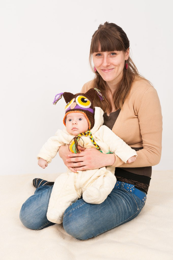 Мама и сын